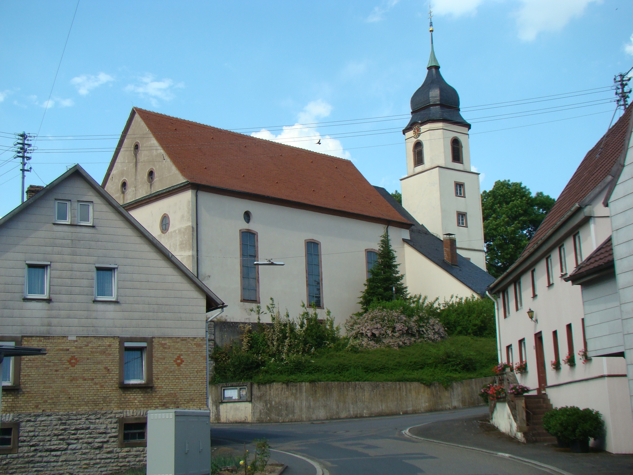 Katholische Kirche Oberwittstadt